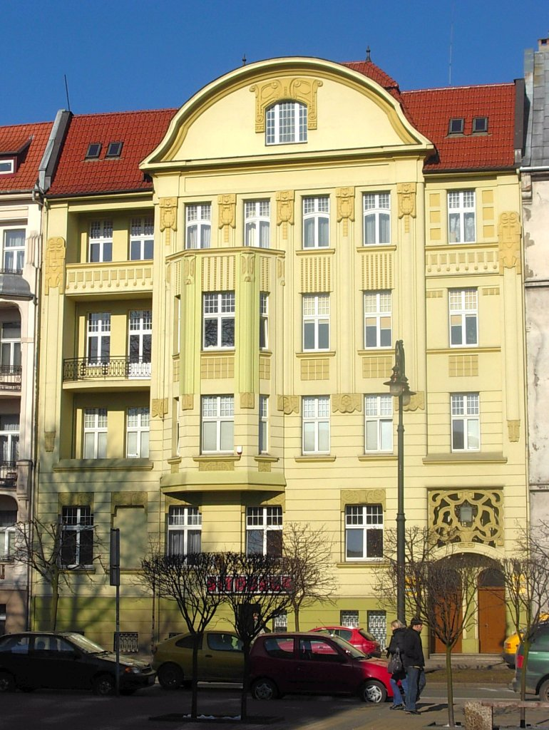 Kamienica ul. Mickiewicza 9 w Bydgoszczy, proj. Rudolf Kern, 1904-1905